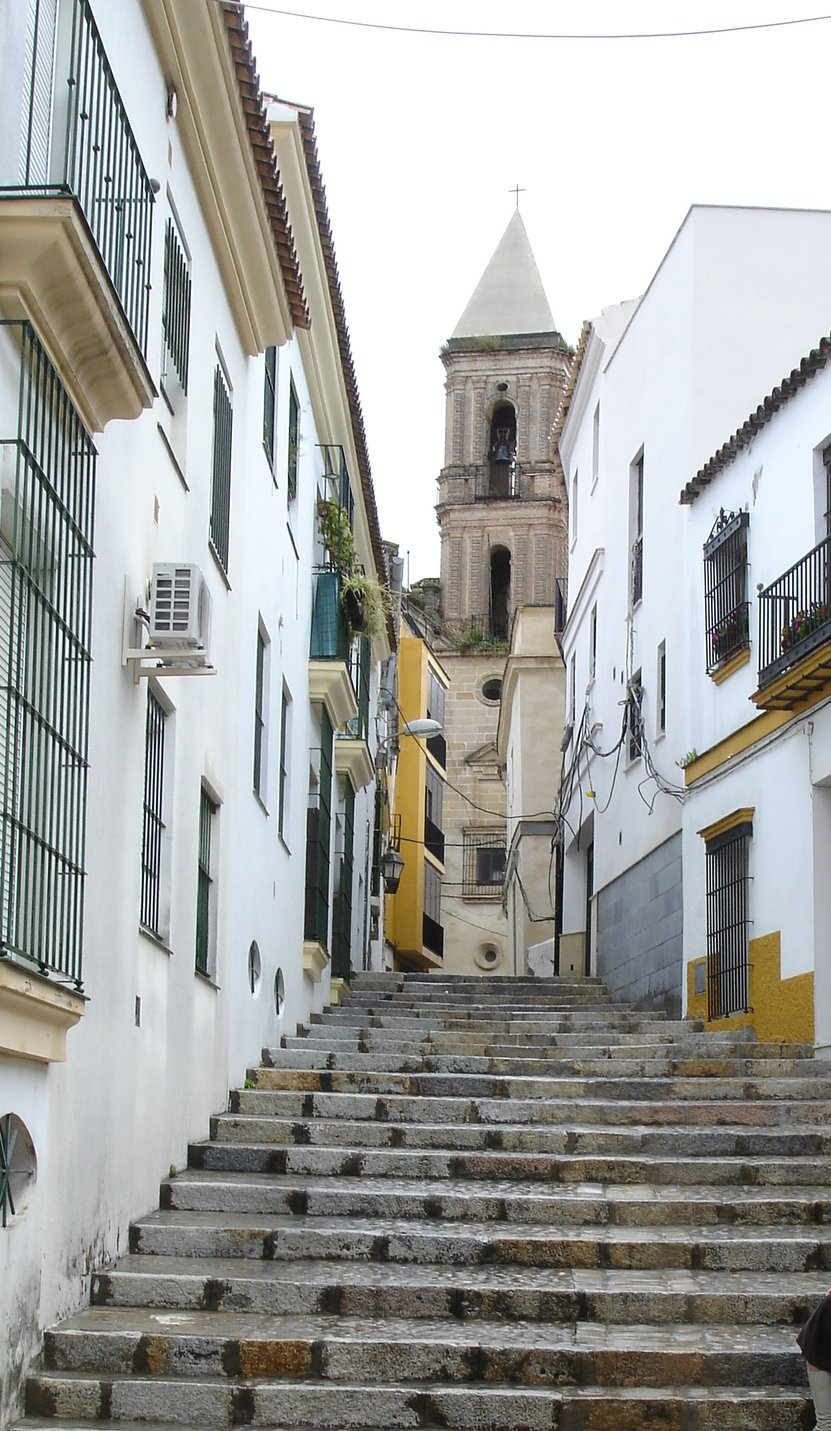 Iglesia del Carmen, Jerez (Spain)